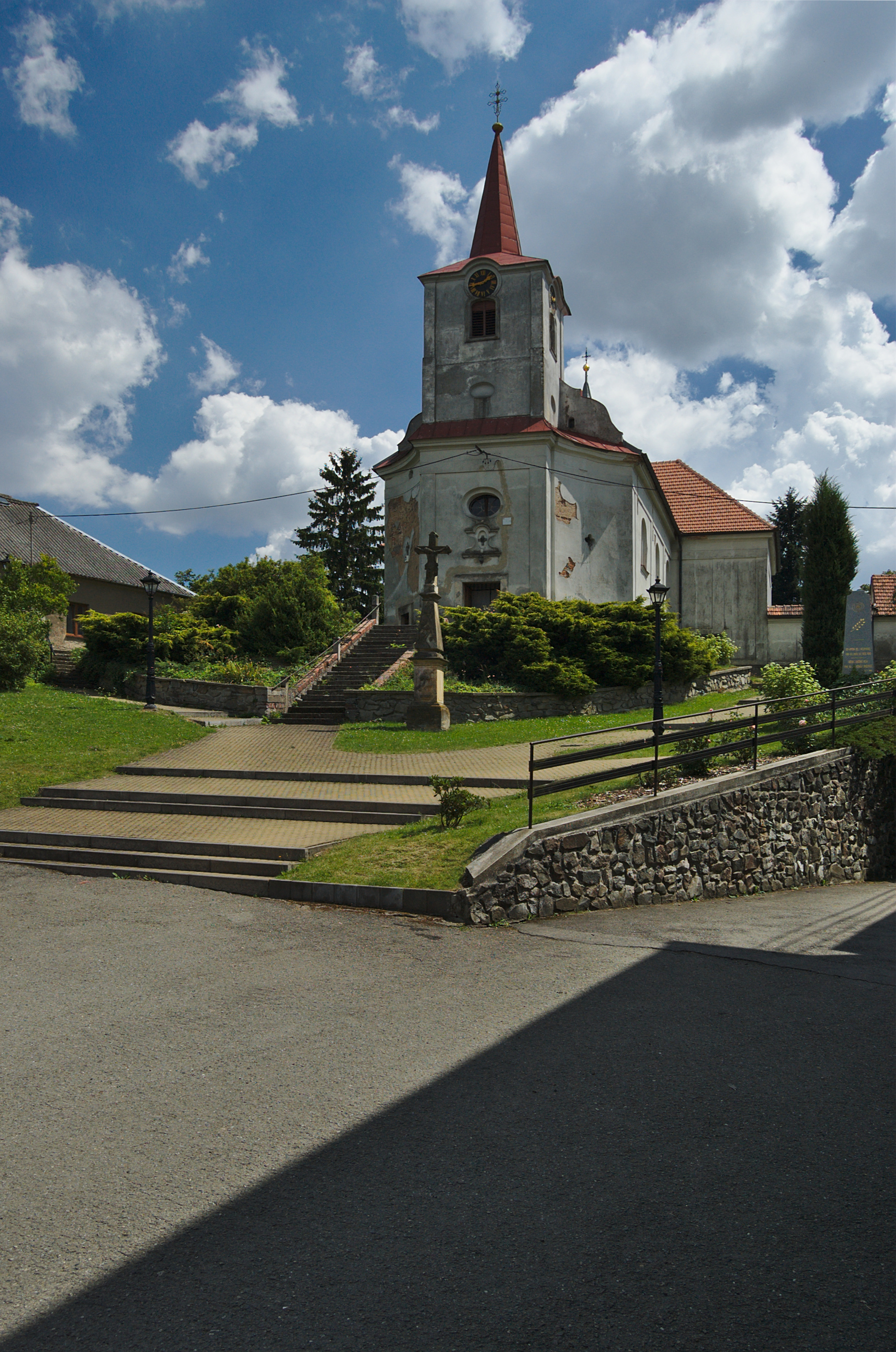 Kostel Nanebevstoupení Páně, Skřípov, okres Prostějov